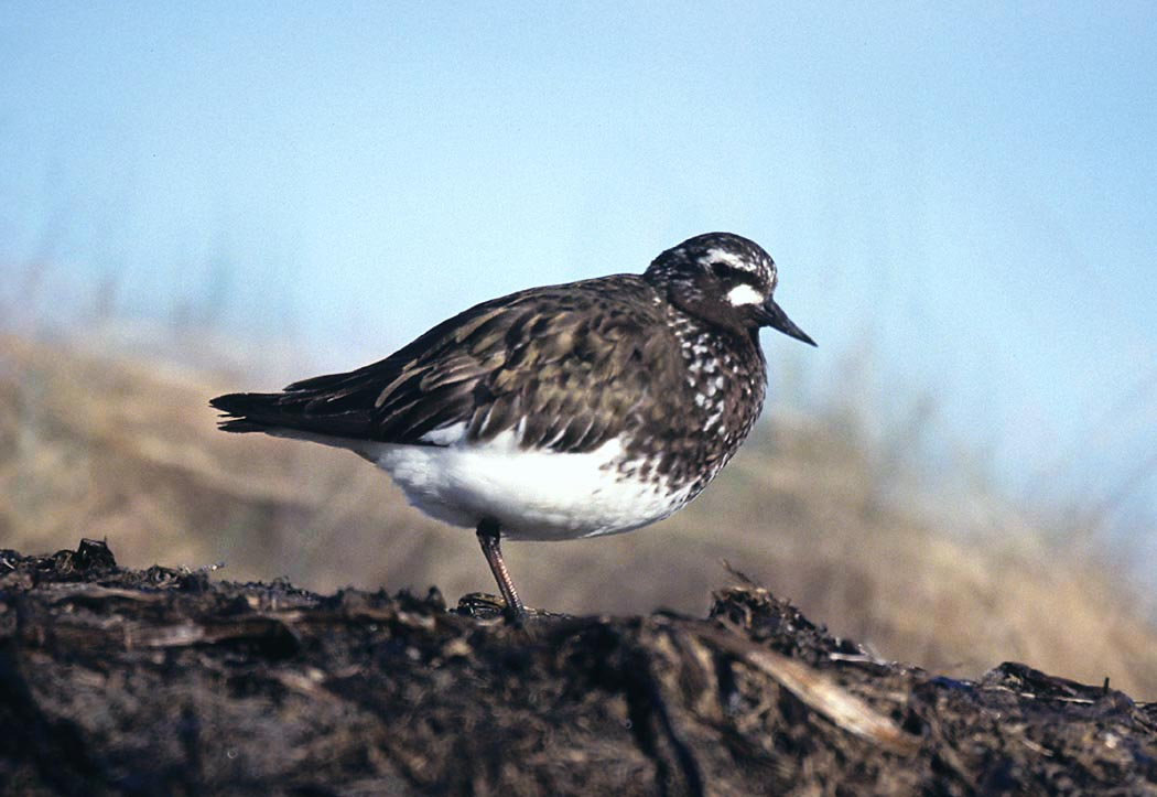 Black Turnstone (Arenaria melanocephala), Alaska